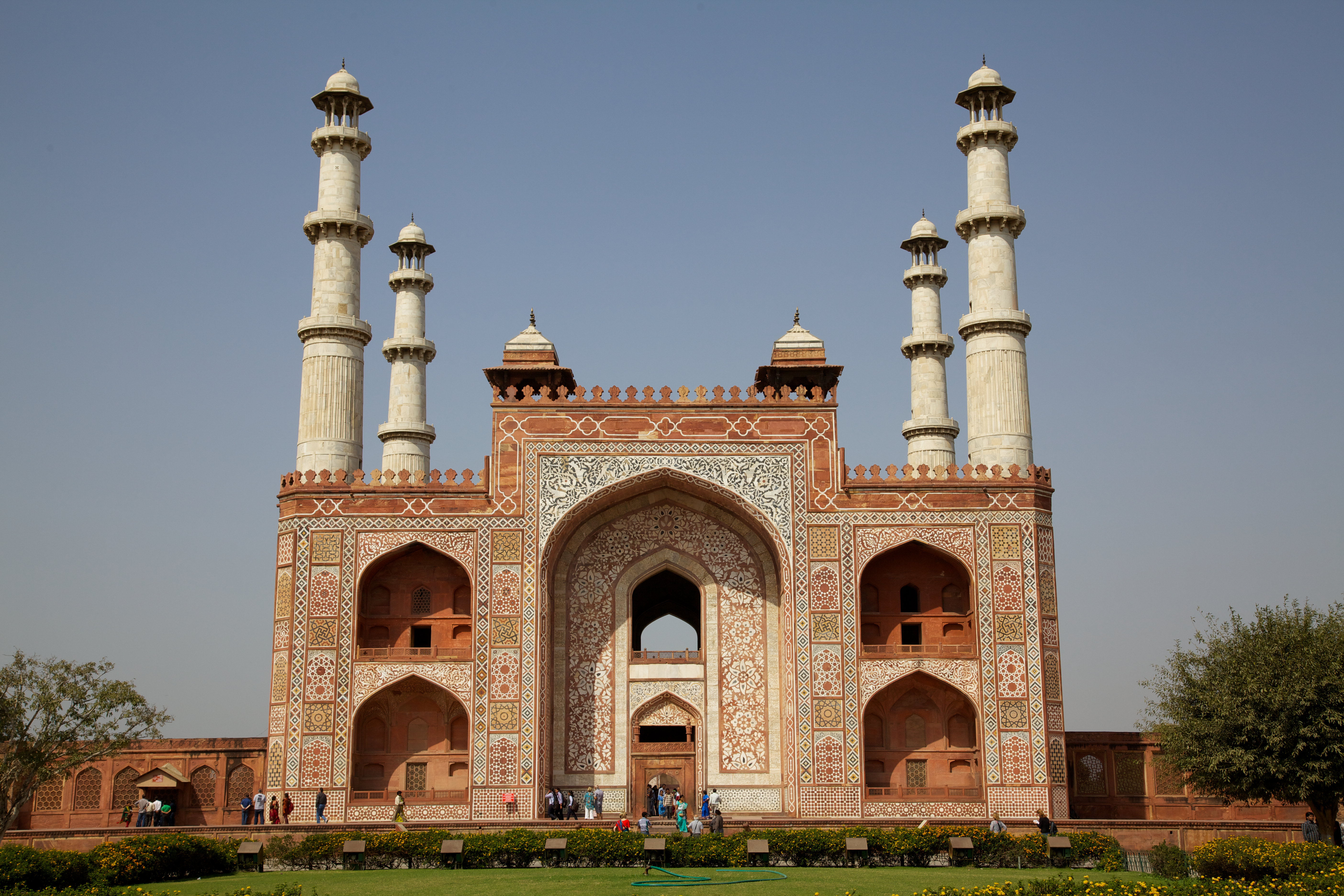 Ort: Agra, Uttar Pradesh, Indien